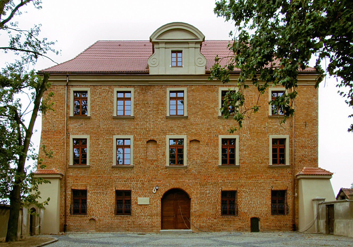 Poznań, Akademia Lubrańskiego (Poznań, Lubrański Academy)